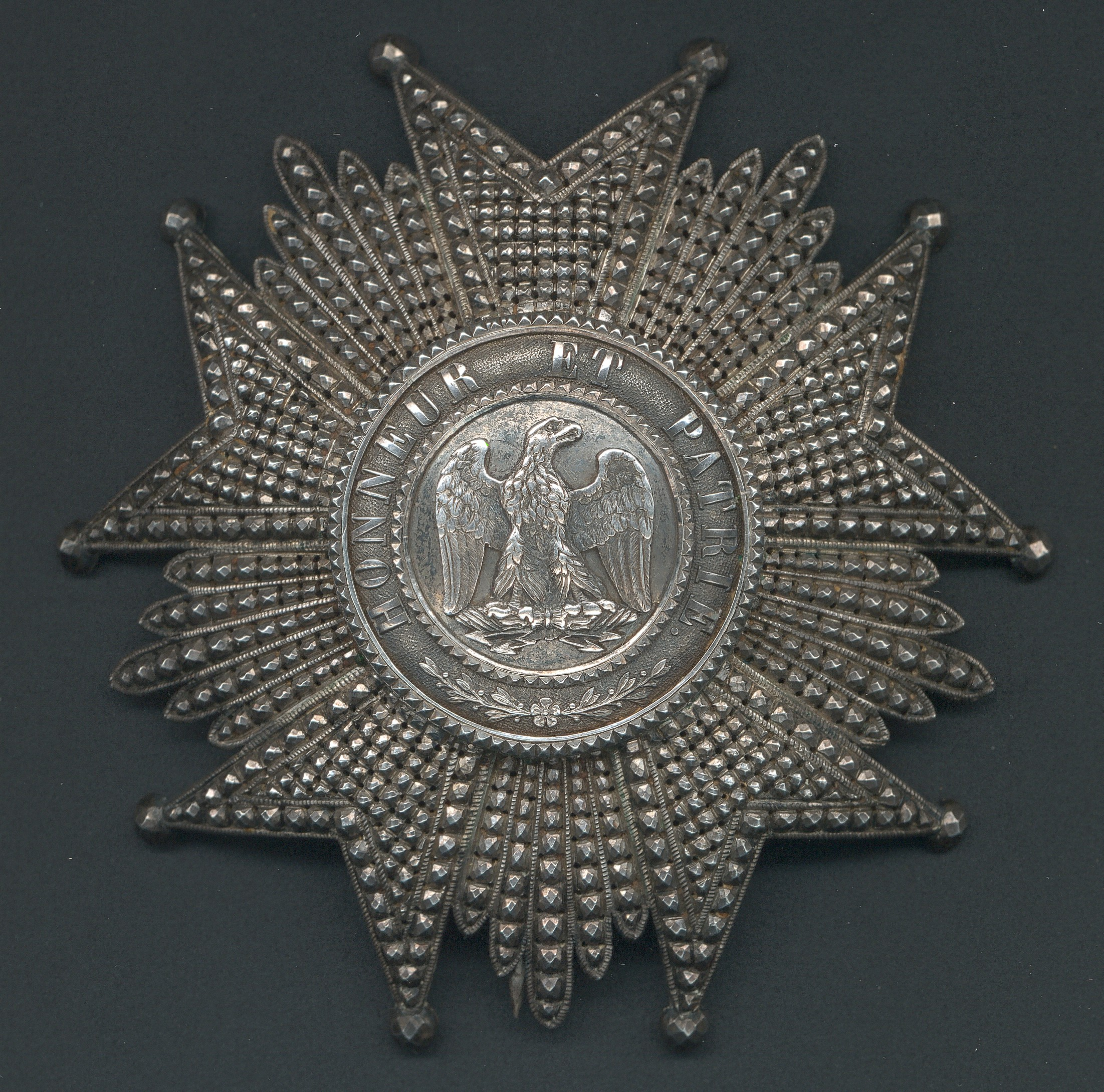 Recto de la plaque de Grand-officier de l'Ordre impérial de la Légion d'honneur offerte à Stanislas Charles Henri Laurent Dupuy de Lôme par la Direction du Matériel.